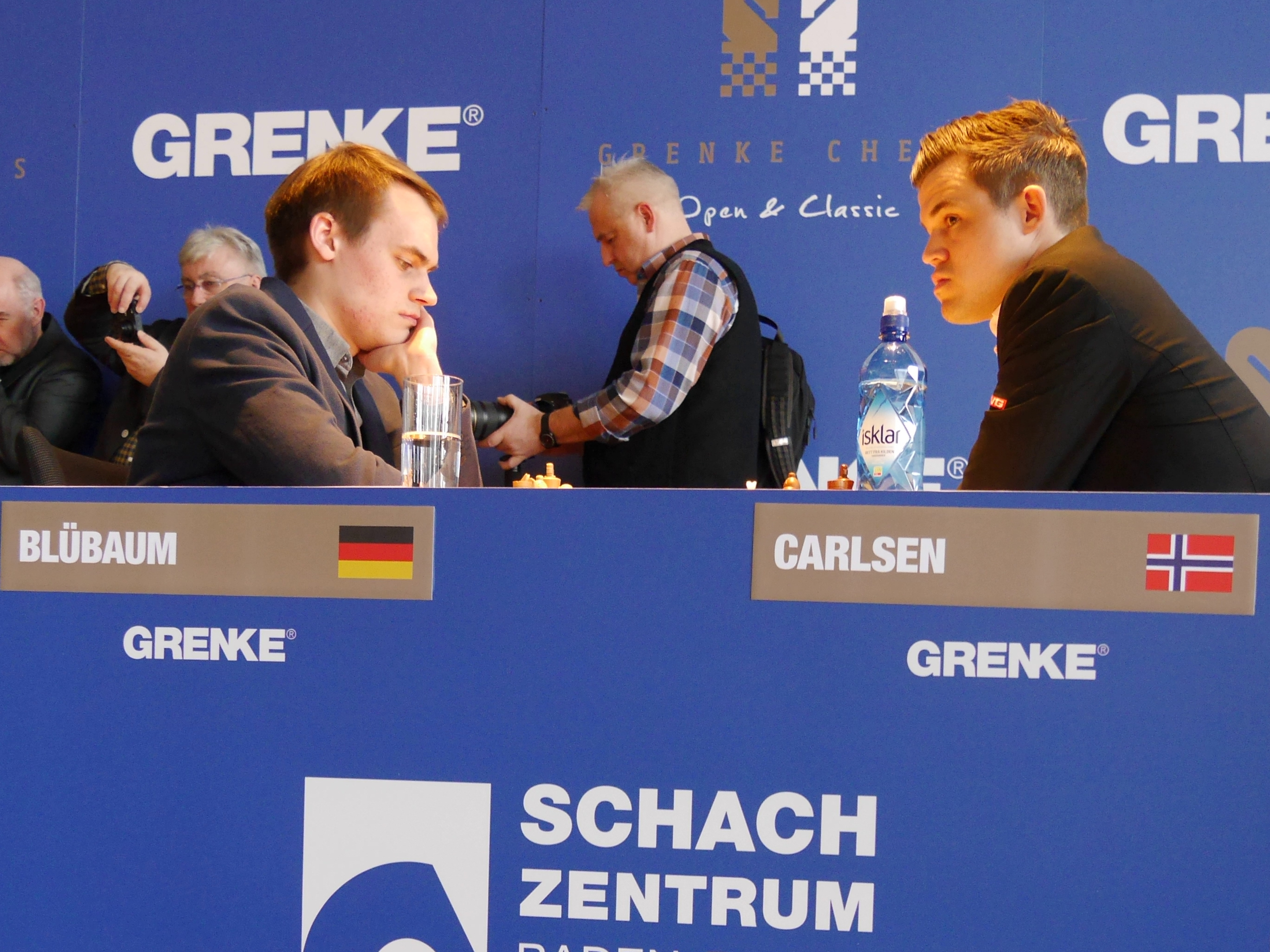 Matthias Blübaum - Magnus Carlsen, Grenke Chess Classic 2018 in Karlsruhe.